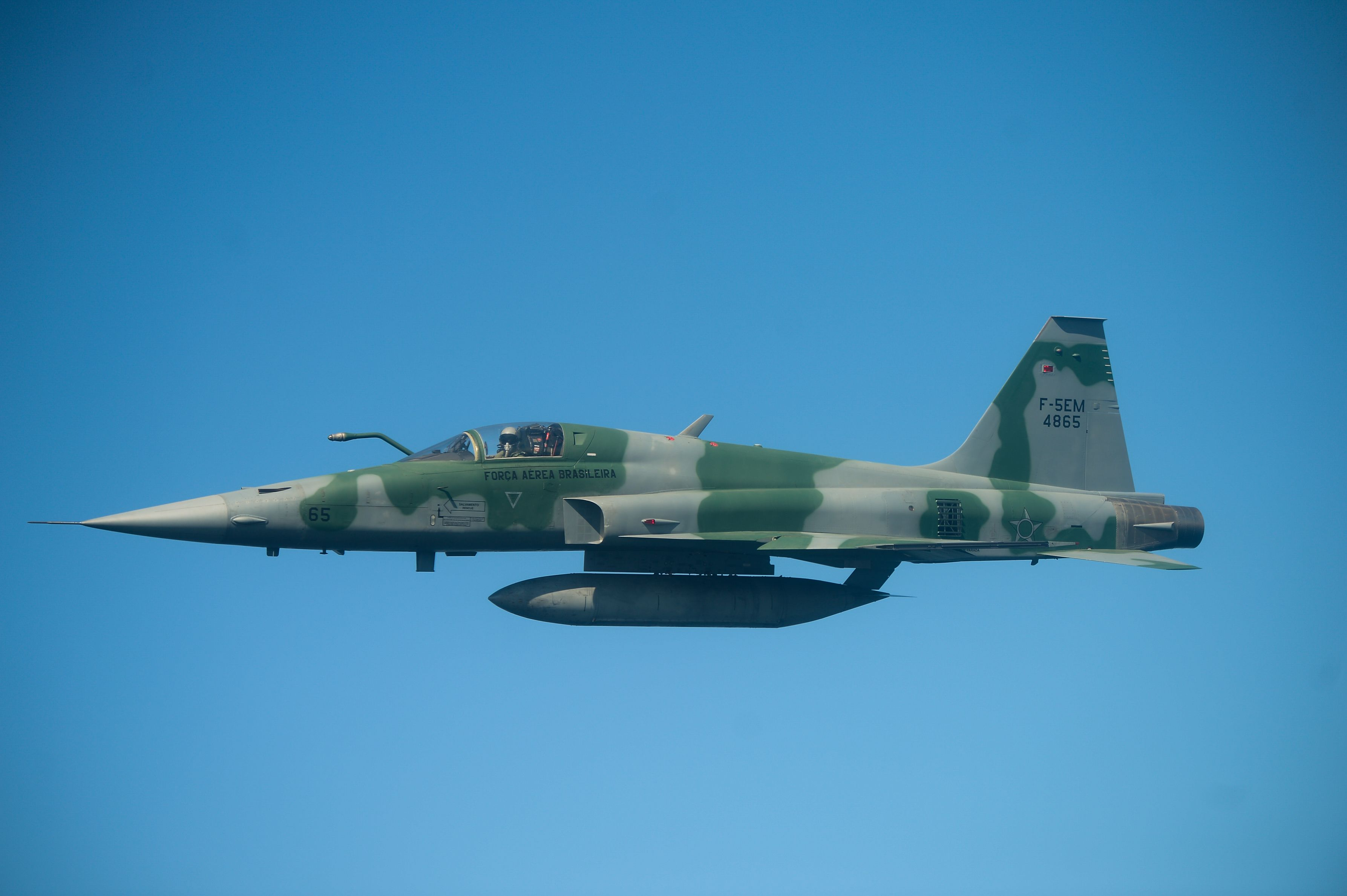 Caça F5 da FAB treina interceptação aérea para os Jogos Olímpicos